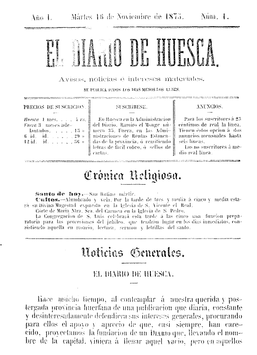 Portada del primer número de El Diario de Huesca, 16 de noviembre de 1875.